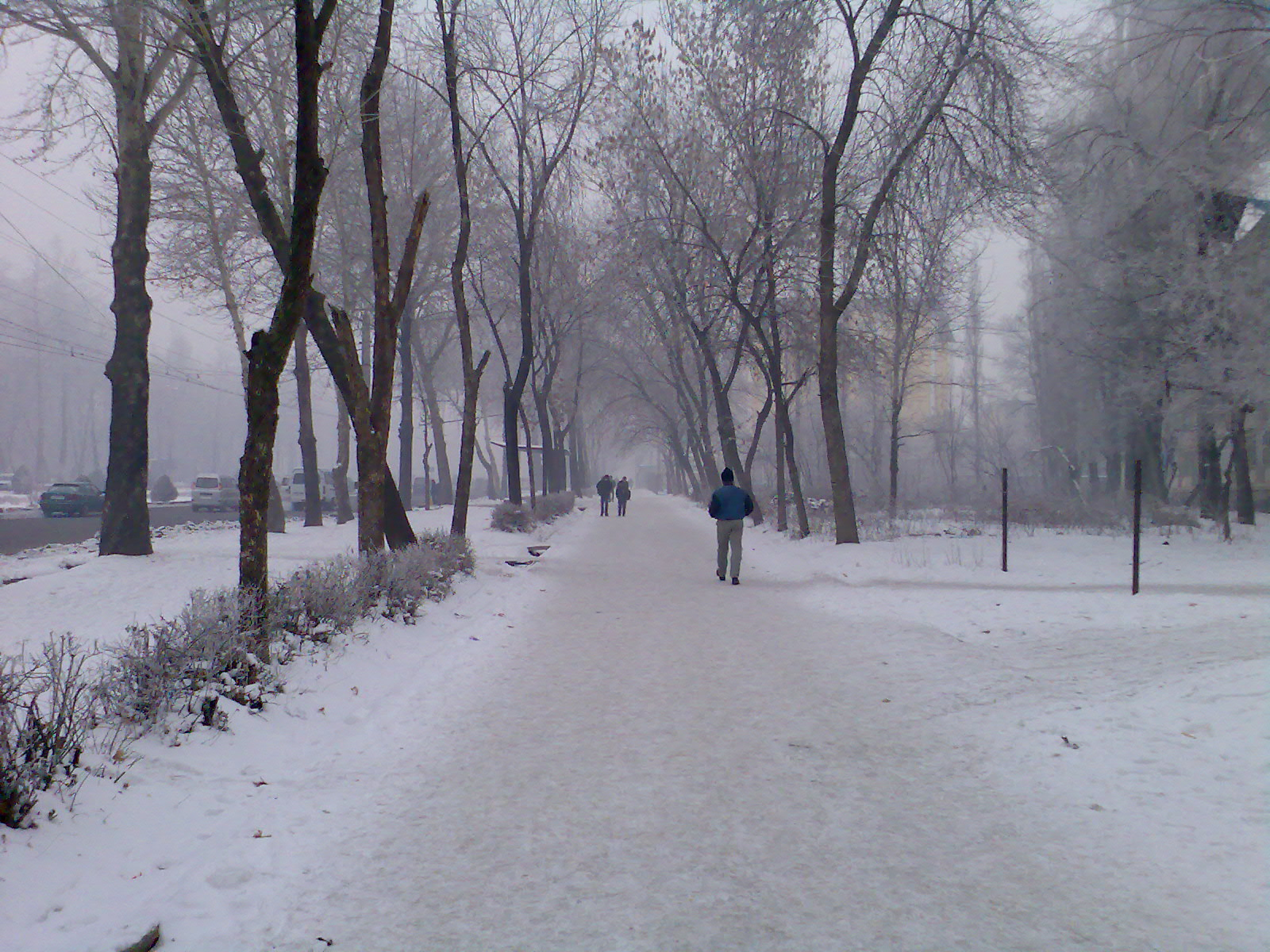 Тоҷикӣ: Зимистони Душанбе. 23 январи соли 2008